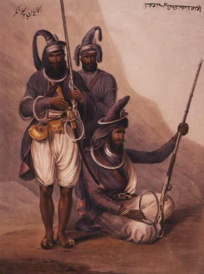 Sikhs with chakram, 1844 Public license This image is in the public domain because its copyright has expired in the United States and those countries with a copyright term of life of the author plus 100 years or less. File history (del) (cur) 19:29, 15 October 2004 . . Pavel Vozenilek (Talk